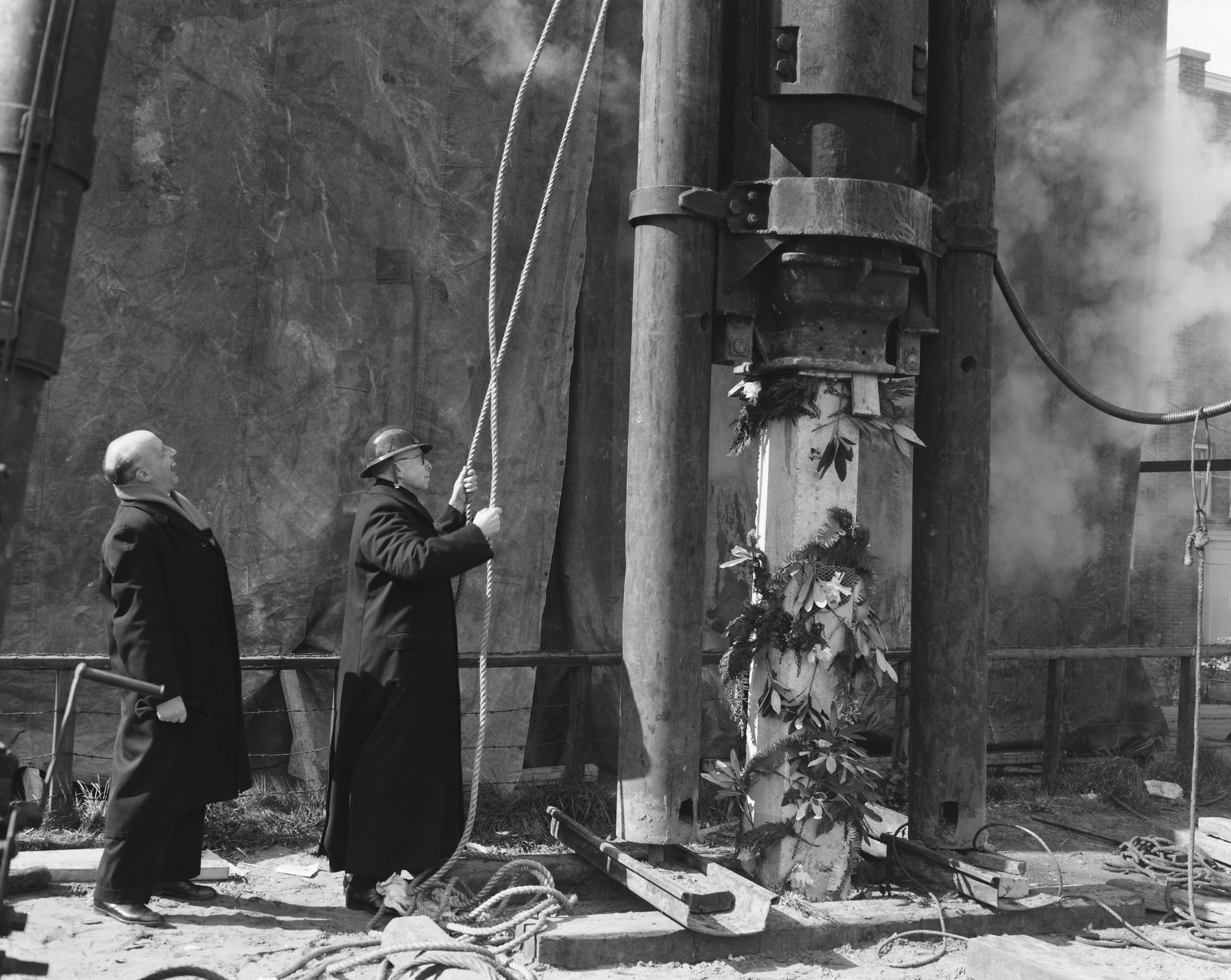 Collectie / Archief : Fotocollectie Anefo Reportage / Serie : [ onbekend ] Beschrijving : Deken van Amsterdam mgr. G. P. J. van der Burg slaat eerste paal voor de Christus Koningkerk in Amsterdam Oost Datum : 4 mei 1957 Locatie : Amsterdam, Noord-Holland Trefwoorden : gebouwen, heien, kerken Persoonsnaam : Burg G P J van der Fotograaf : Rossem, Wim van / Anefo Auteursrechthebbende : Nationaal Archief Materiaalsoort : Negatief (zwart/wit) Nummer archiefinventaris : bekijk toegang 2.24.01.04 Bestanddeelnummer : 908-5500